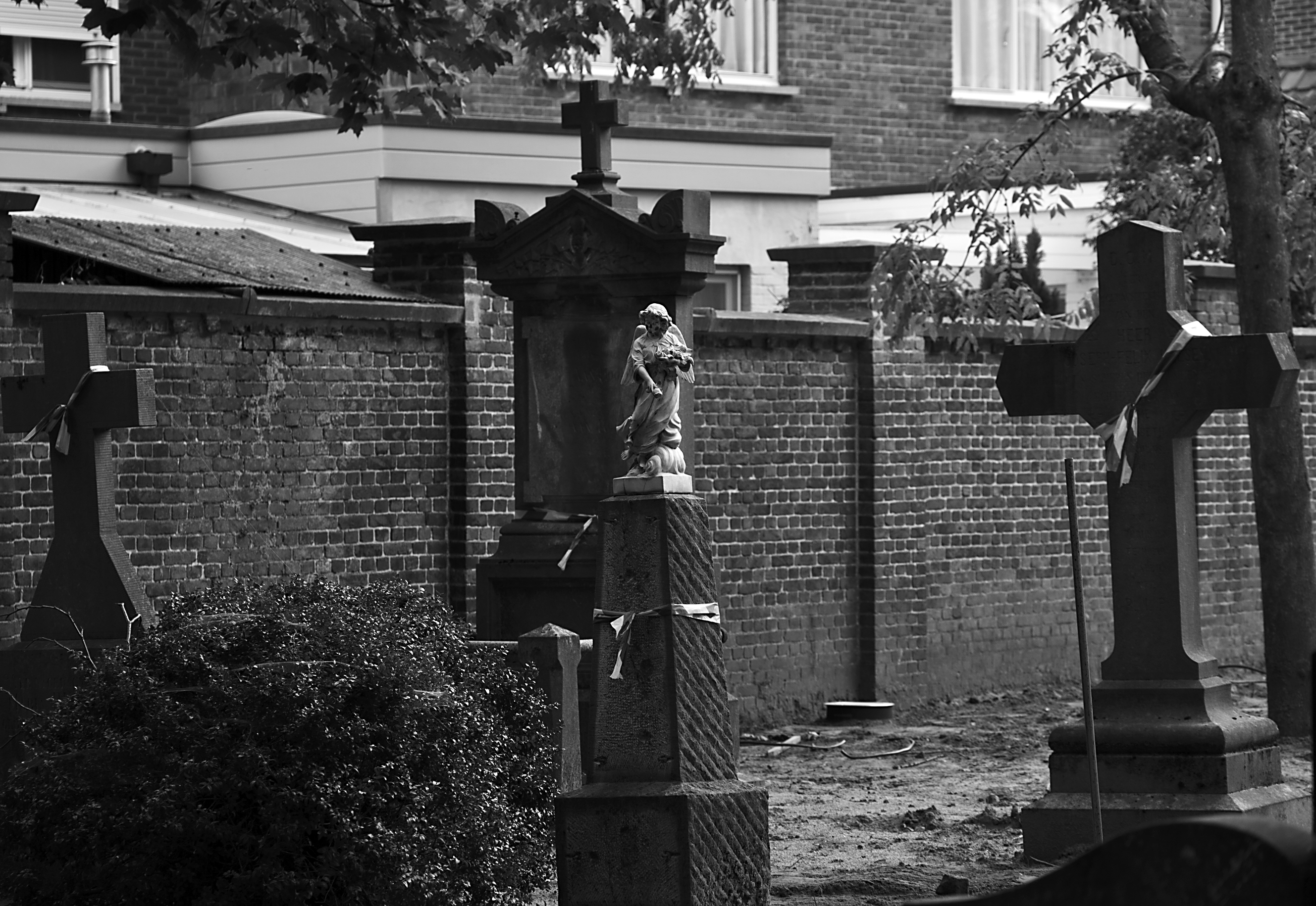 Het oude,ommuurde kerkhof in het centrum van Mol ondergaat momenteel een gedaanteverwisseling. Het wordt een wandel-en rustpark.De historische,waardevolle graven worden geïntegreerd in hun natuurlijke omgeving. De muur langs de straatkant is reeds gesloopt.